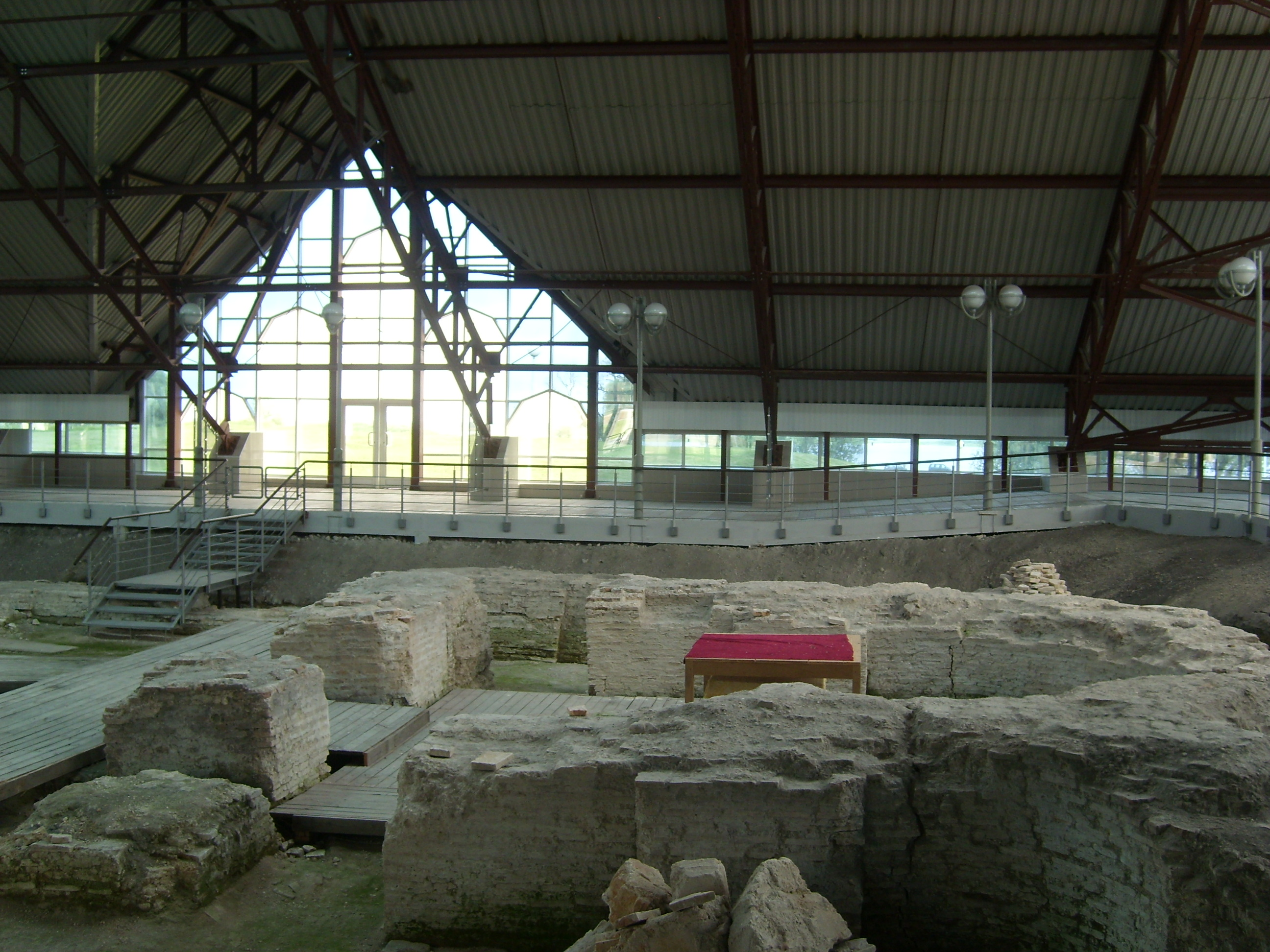 Беларуская (тарашкевіца): Гарадзішча старажытнага Турава пэрыяду раньняга сярэднявечча. г. Тураў This is a photo of Belarusian heritage monument. Reference number: 313В000360 ( WLM)